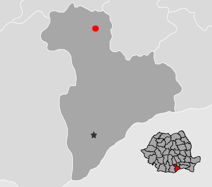 Source:Base Giurgiu.png